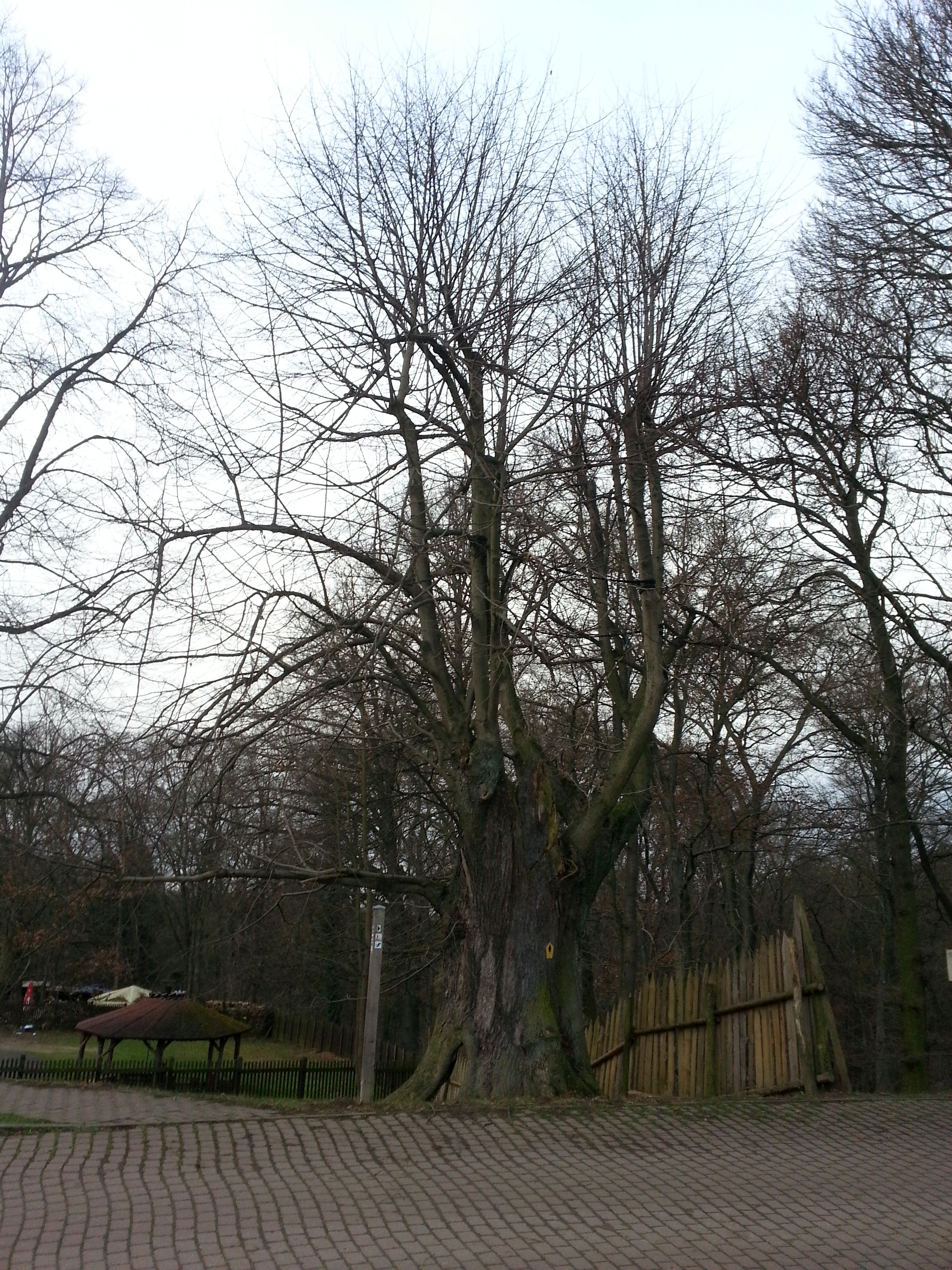 Naturdenkmal Sommerlinde Rabenstein